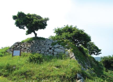 기장 죽성리왜성 본경